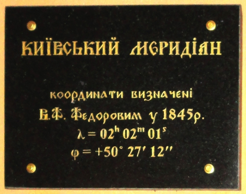 Меморіяльна дошка на будунку Астрономічної обсерваторії Київського університету